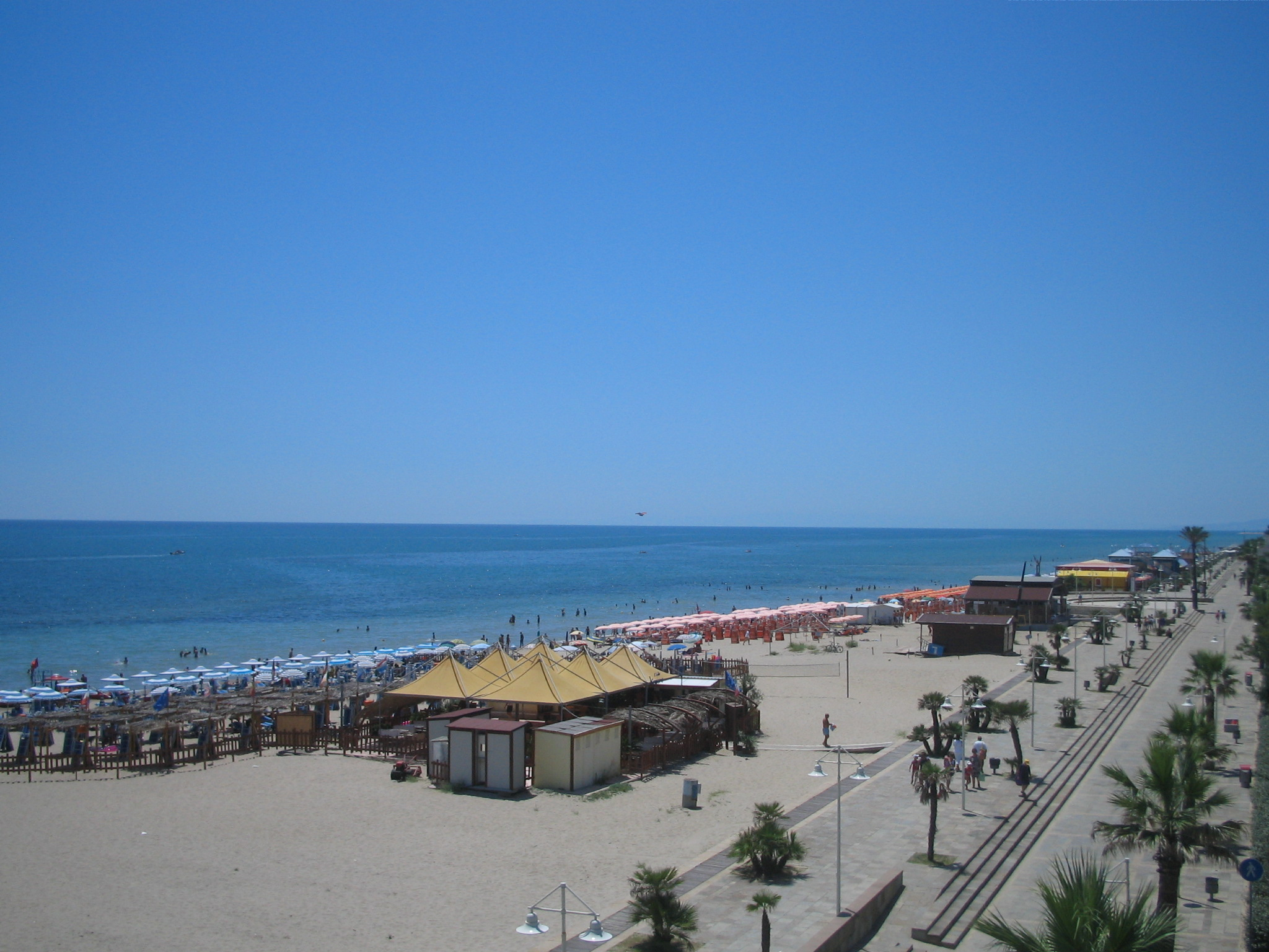 Lungomare e spiaggia di Metaponto